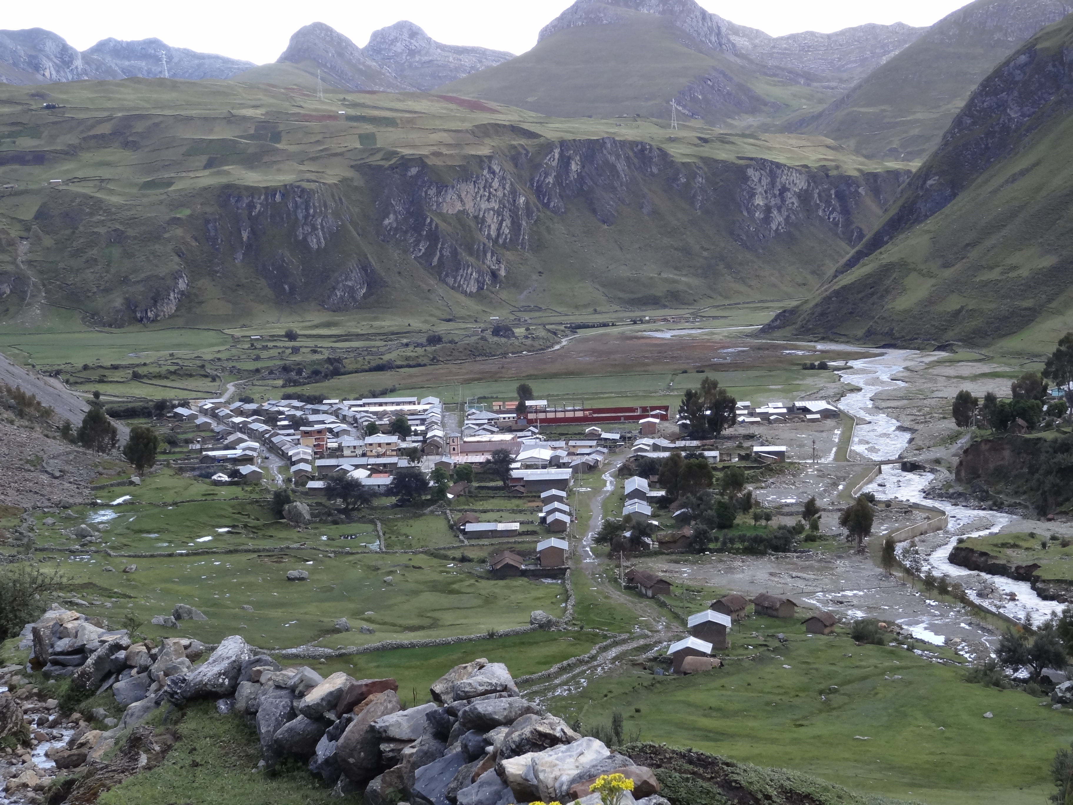 Vista total de la ciudad de Queropalca.